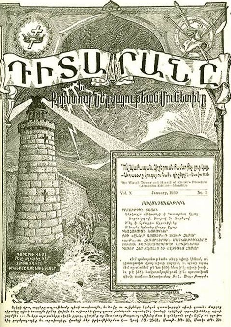 Strażnica w języku ormiańśkim wydanie amerykańskie (styczeń 1930, rok X)